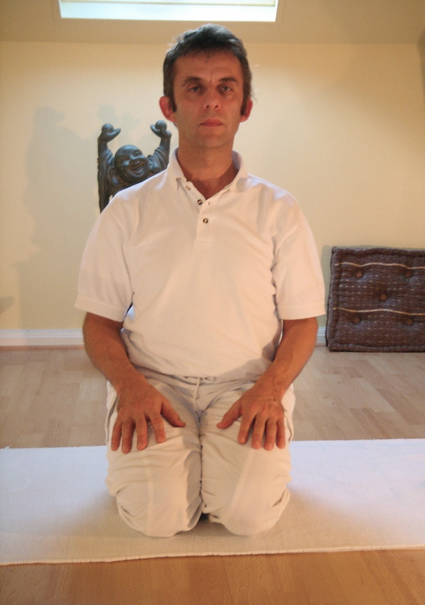 Yoga postures Vajrasana